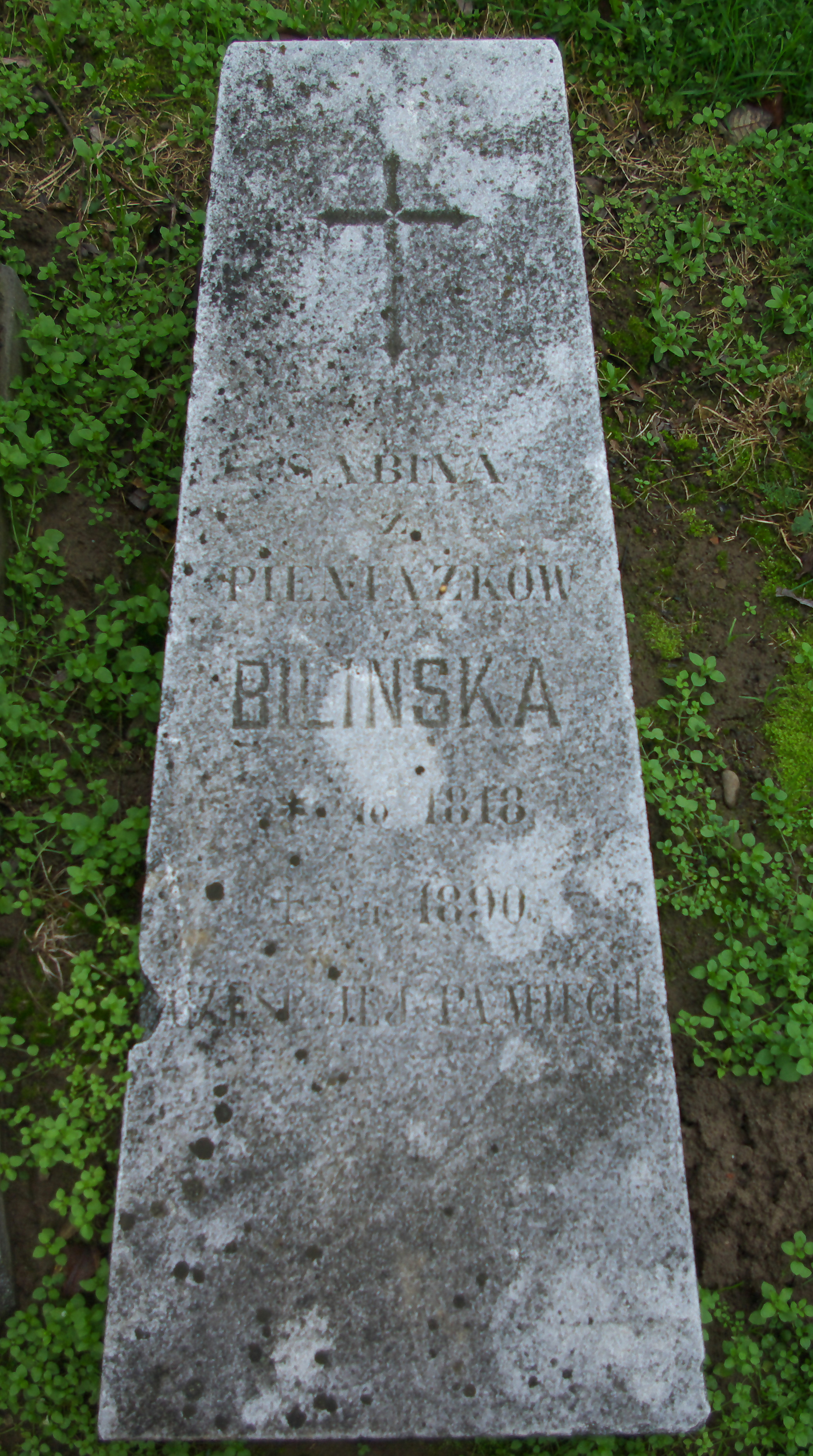 Lapidarium nagrobków przy kościele z Bączala Dolnego w skansenie w Sanoku.